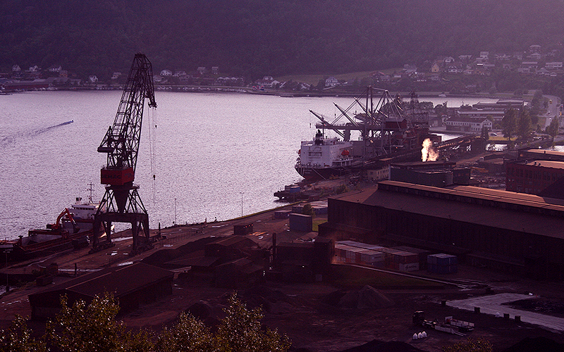 Skipene ligger ved importkaien til Eramet Norways havnebasseng.